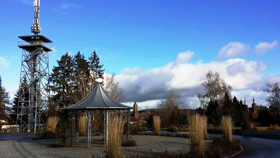 Blick vom Hubenloch auf Villingen. Mit Aussichtsturm und Schutzdach.